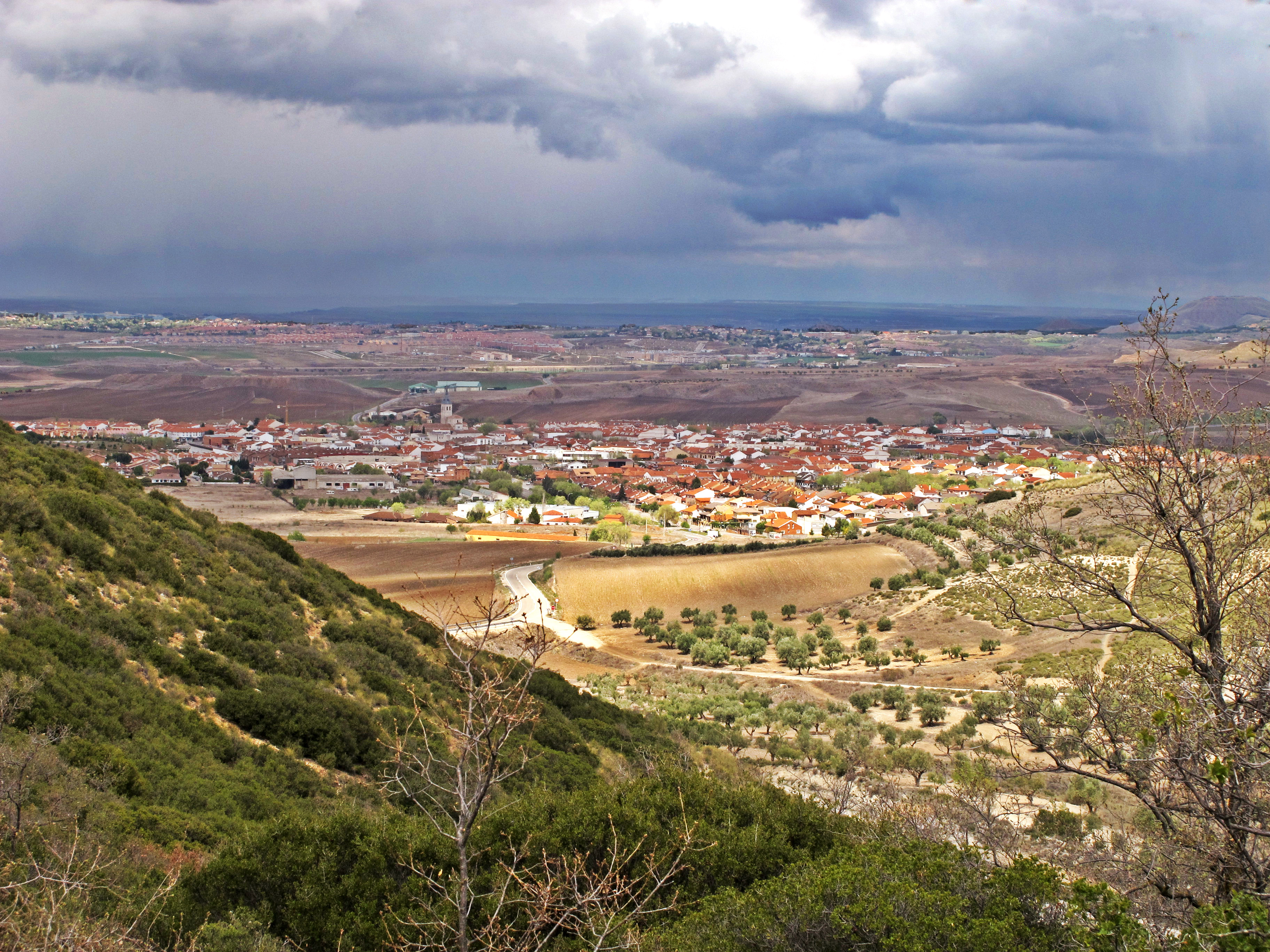 Los martes nubes !!!!♥ Los orígenes de Torres de la Alameda como núcleo urbano son de la época romana .